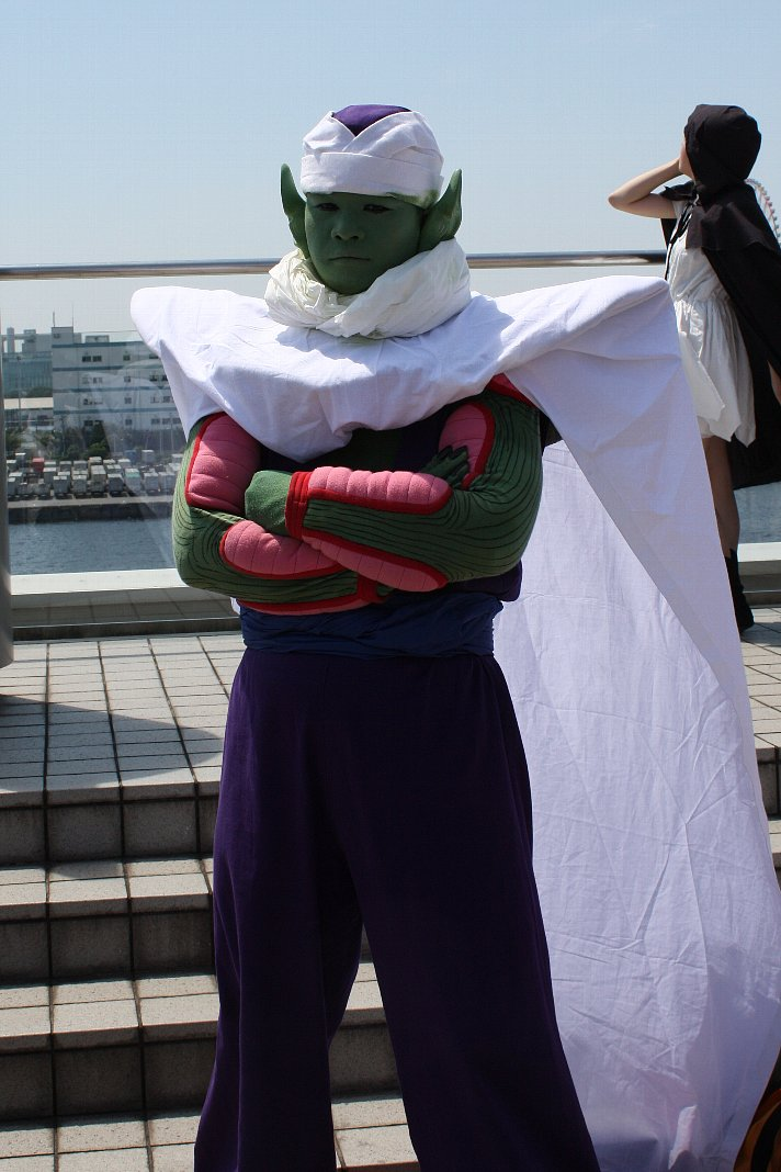 Comic Market 76，《七龍珠》比克cosplayer。